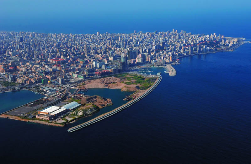 Vista de la ciudad de Beirut, Líbano.